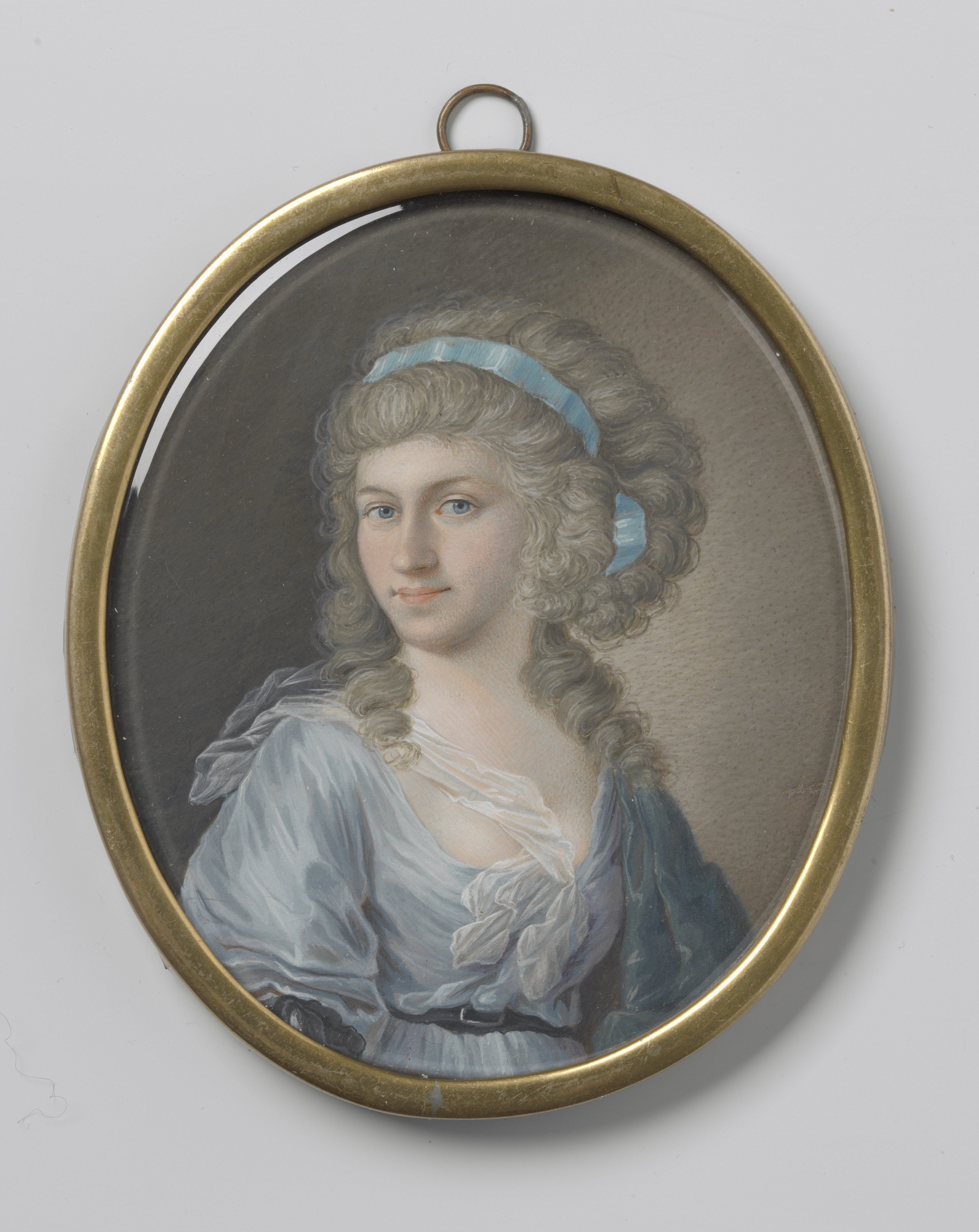 Portret van een vrouw. Ten halven lijve, het hoofd iets naar links gekeerd, de beschouwer aanziend. Onderdeel van de collectie portretminiaturen.